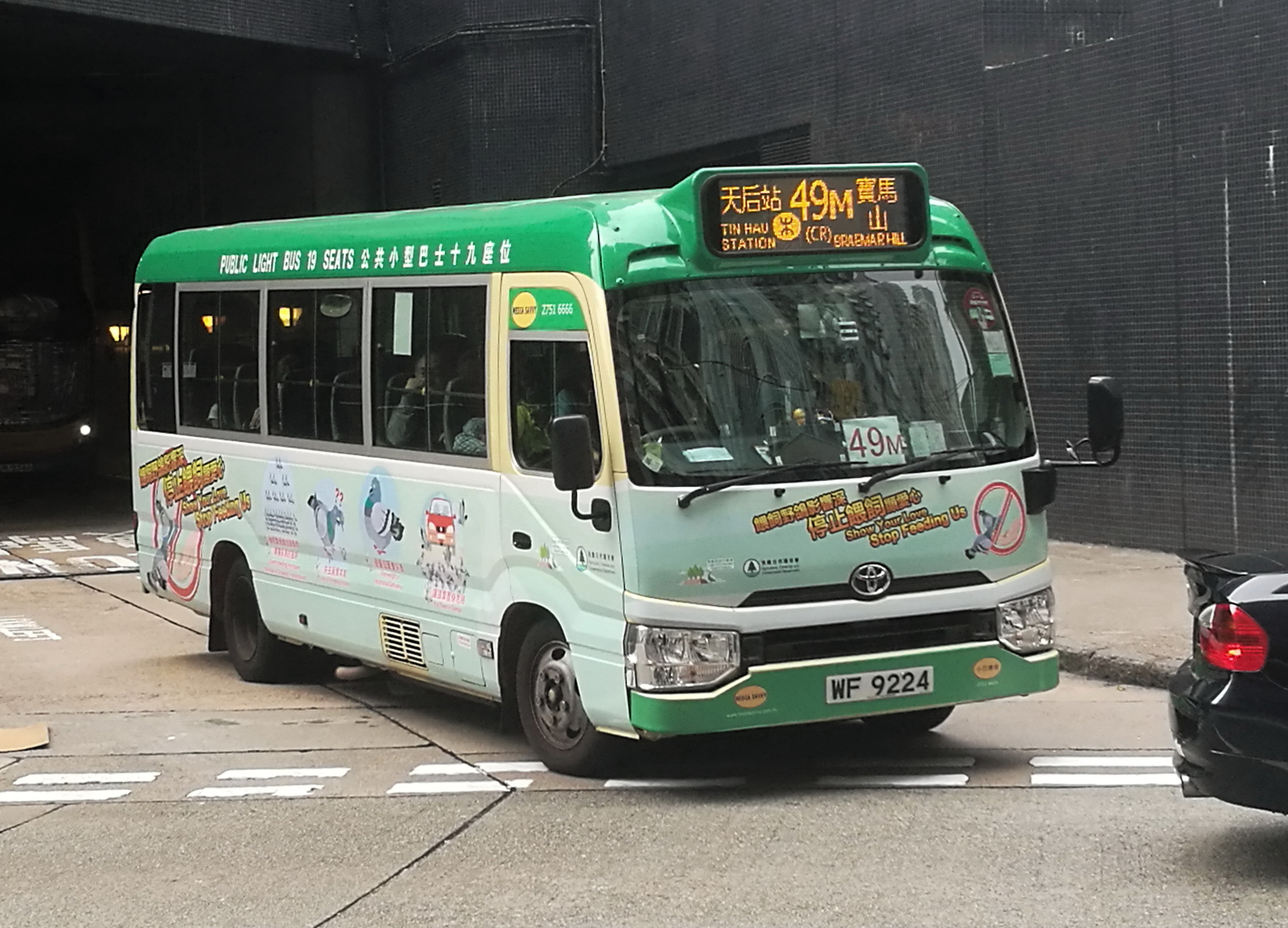 中文（中国大陆）: 小巴WF9224的照片